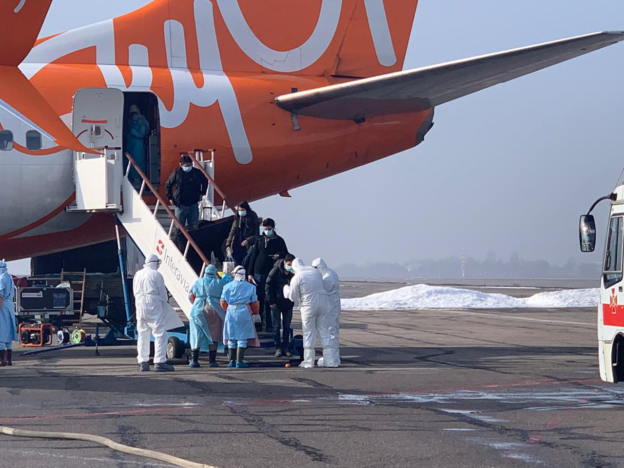 У Міжнародному аеропорту міста Харків співробітники Держприкордонслужби забезпечили прикордонне оформлення 94 осіб, які прибули спецрейсом з Китаю.